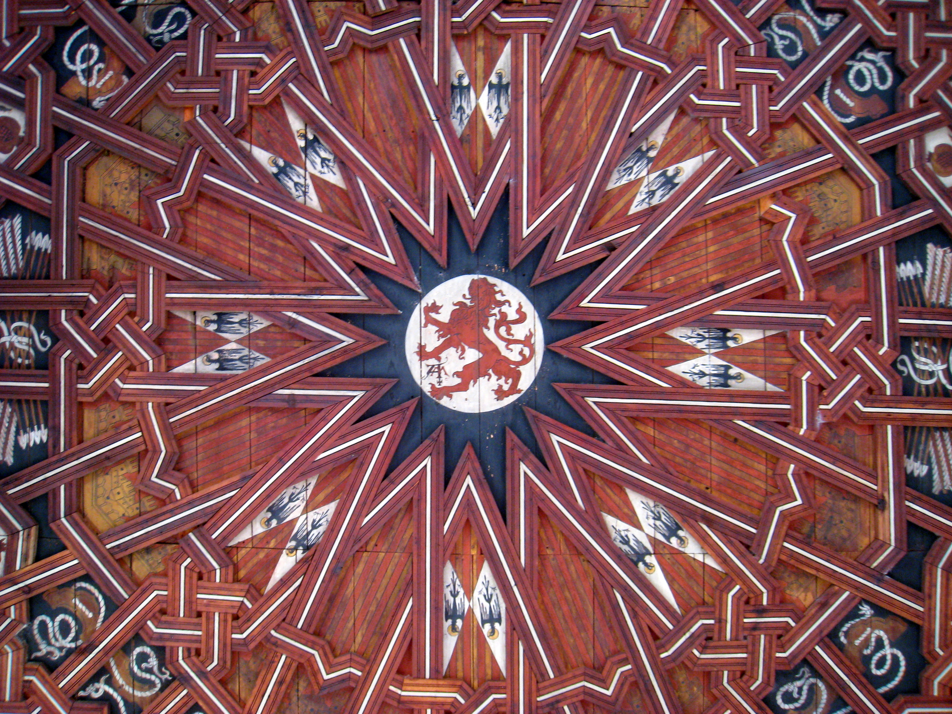 San Juan de los Reyes - Toledo, Spain.